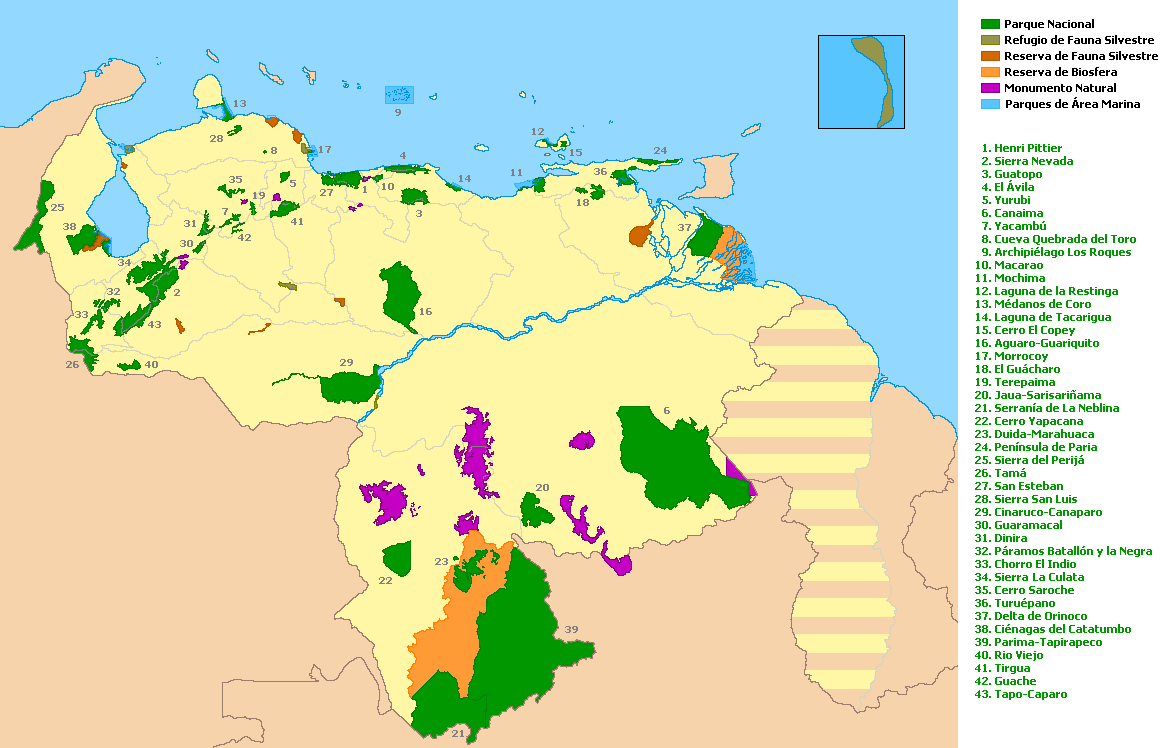 Parques Nacionales Naturales de Venezuela (Noviembre de 2008)